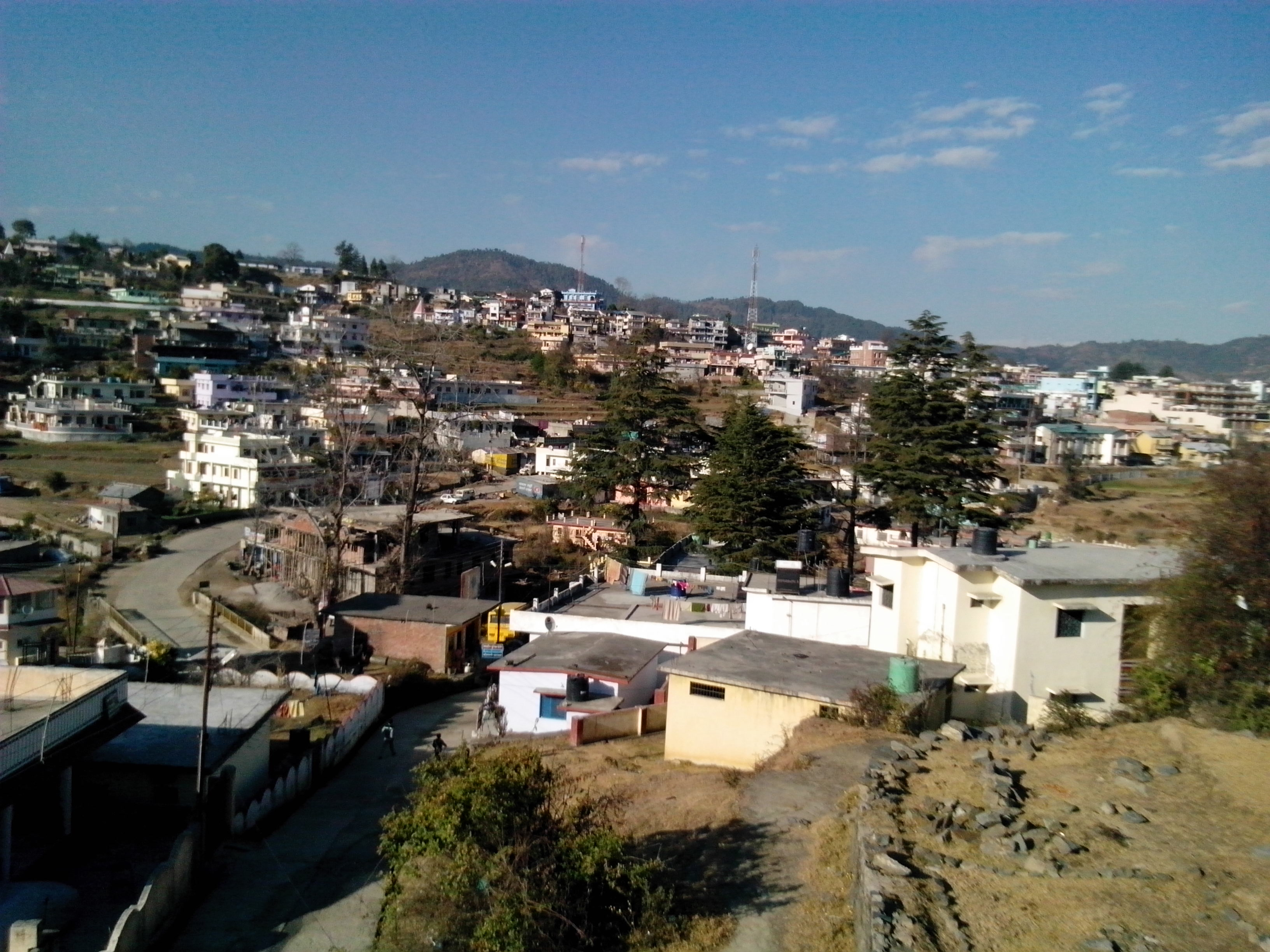 champawat.....